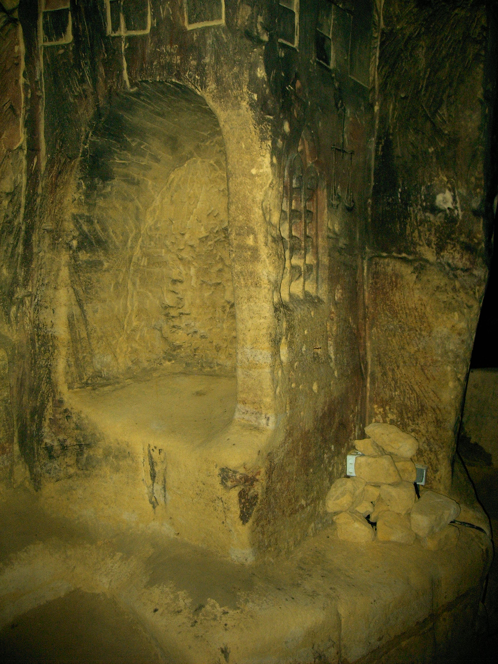 Fluweelengrot:Biechtstoel in de kapel